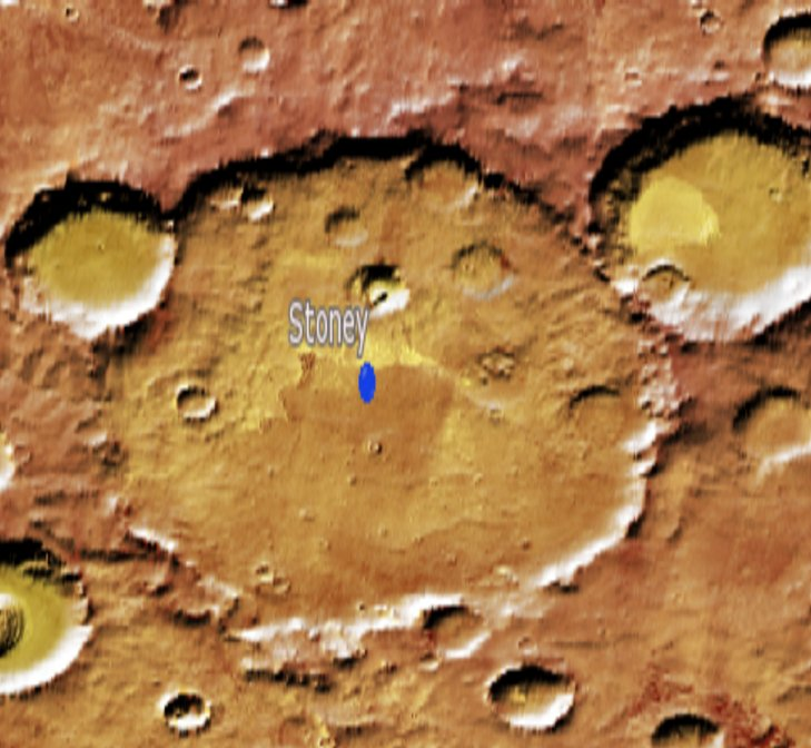 Cráter marciano Stoney. (Imagen IAU/USGS/Goddard/A SU/USGS)